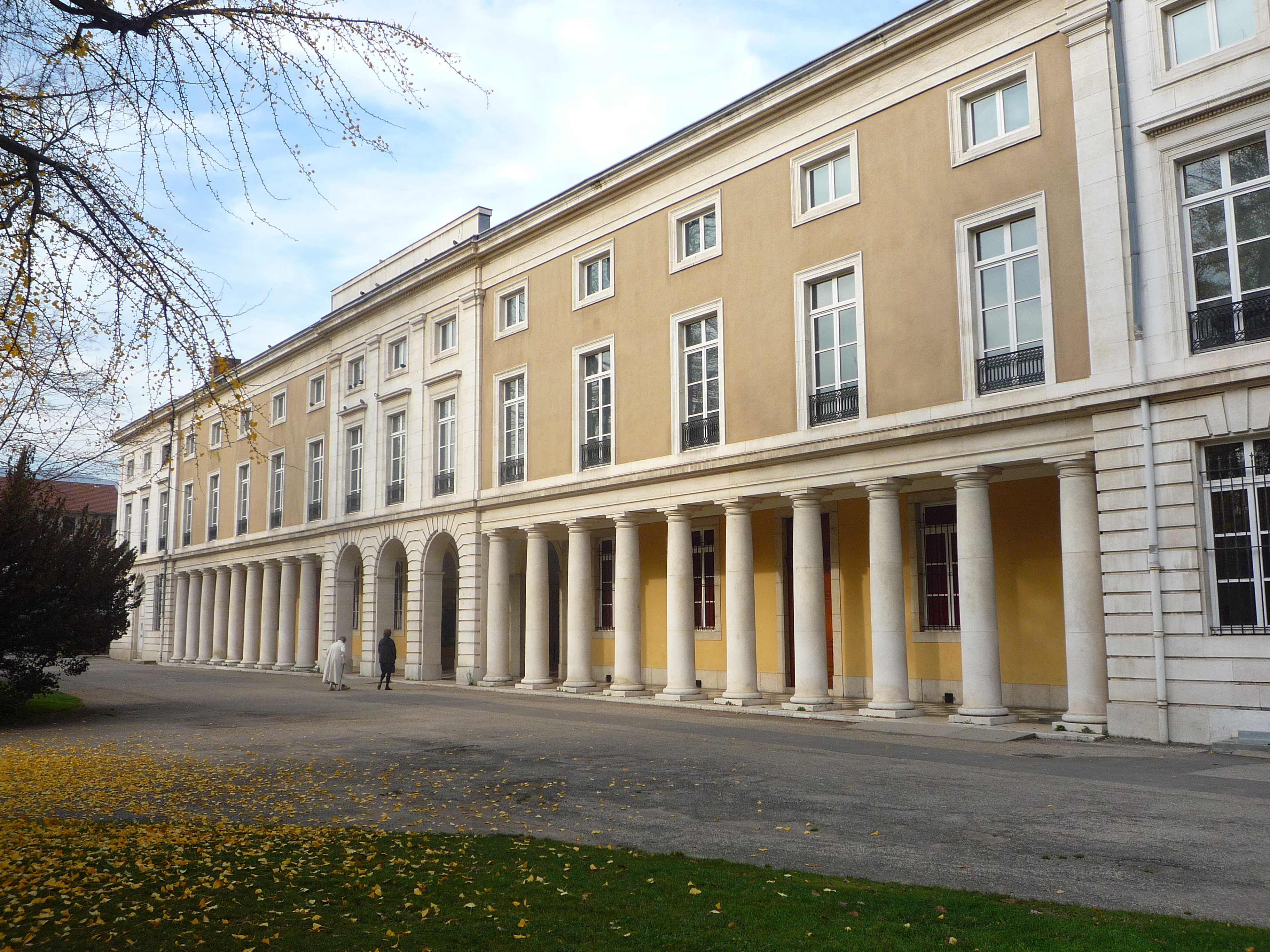 Muséum d'histoire naturelle (1855) -- Grenoble